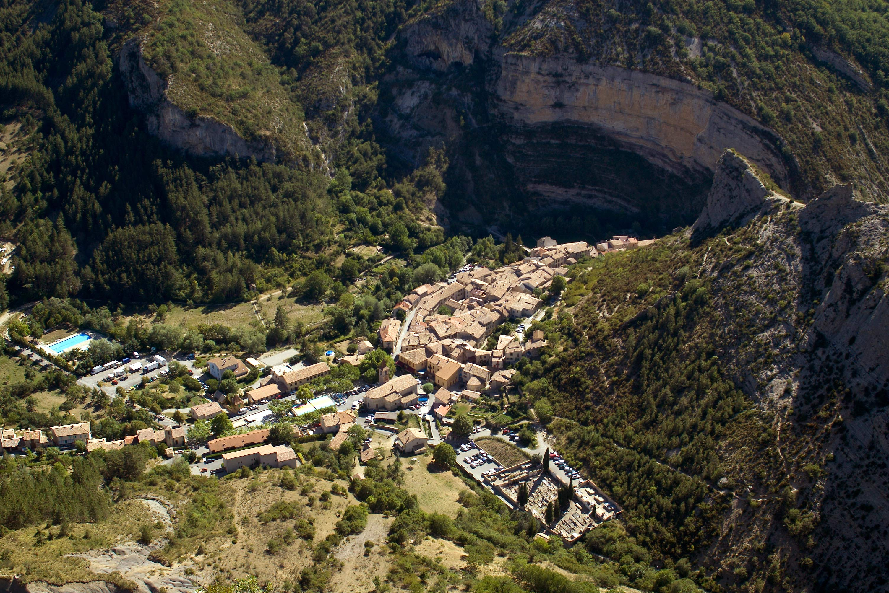 Widok z lotu ptaka na Orpierre (z górującego nad miejscowością szczytu Quiquillon). Droga RN75 wiedzie do miasta z lewej strony zdjęcia (z Eyguians), przebijając się wraz z rzeką Ceans przez skalną bramę widoczną po prawej. W centrum kościół, na dole cmentarz, w lewym górnym rogu jeden z trzech basenów. Jestem autorem tego zdjęcia - Andrzej Makarczuk.